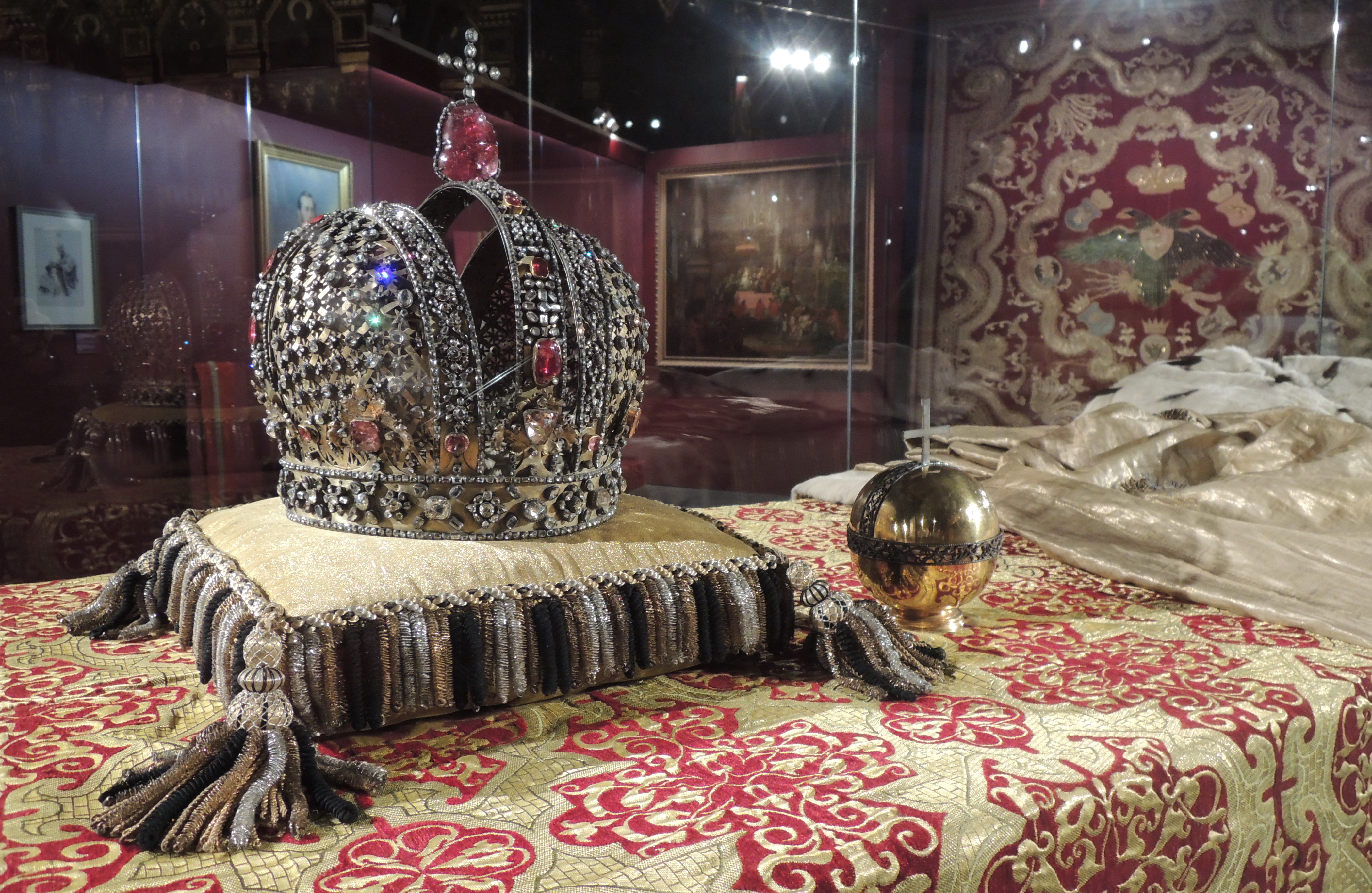 Корона Анны Иоанновны